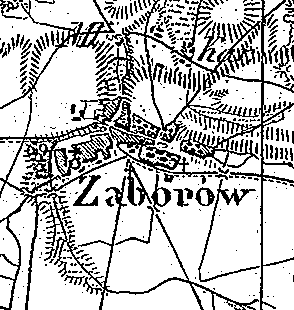 Zaborów na mapie Topograficznej Królestwa Polskiego 1839, part of map